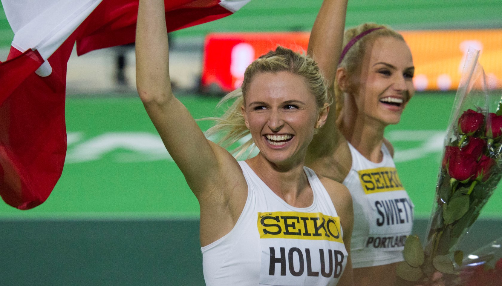 5182 pools 4x400m team